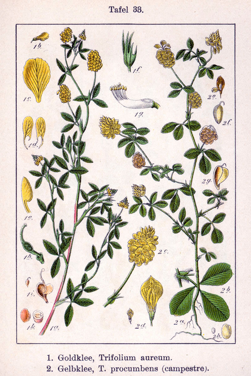 1. Trifolium aureum Pollich 2. Trifolium campestre Schreb. Original Description 1. Goldklee, Trifolium aureum 2. Gelbklee, Trifolium procumbens (campestre)